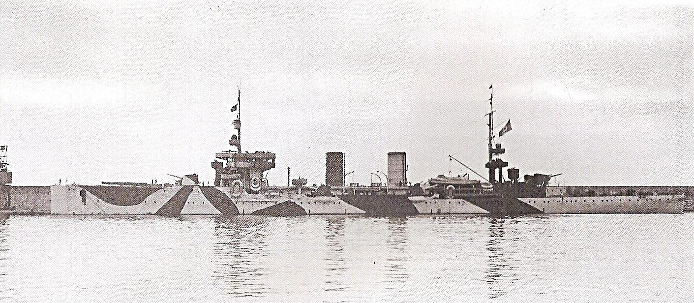 L’incrociatore leggero Bari a Bastia, durante lo sbarco italiano in Corsica.